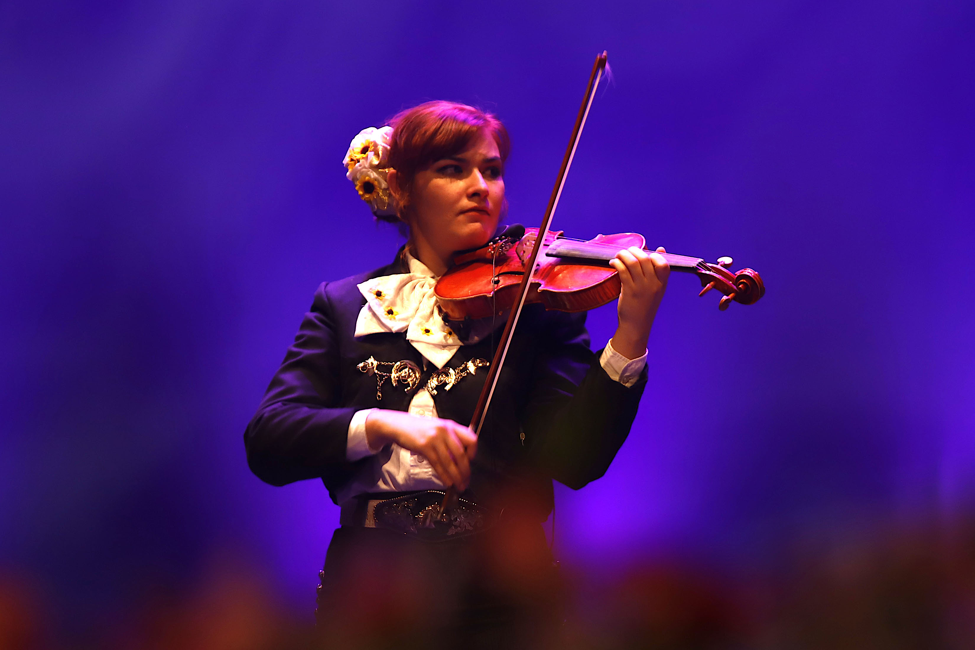 Miércoles 6 de mayo de 2020 En el Teatro de la Ciudad Esperanza Iris, se realizó la grabación de Cantemos con Mamá desde Casa, con la participación decenas de mariachis, quienes interpretaron melodías de su repertorio vernáculo. Entre las agrupaciones musicales se encontraba, Mariachi Garibaldi, Julio Ponce acompañado del Mariachi Estampas de México, así como Amanecer Jalisciense. Fotografía: Milton Martínez/ Secretaría de Cultura de la Ciudad de México